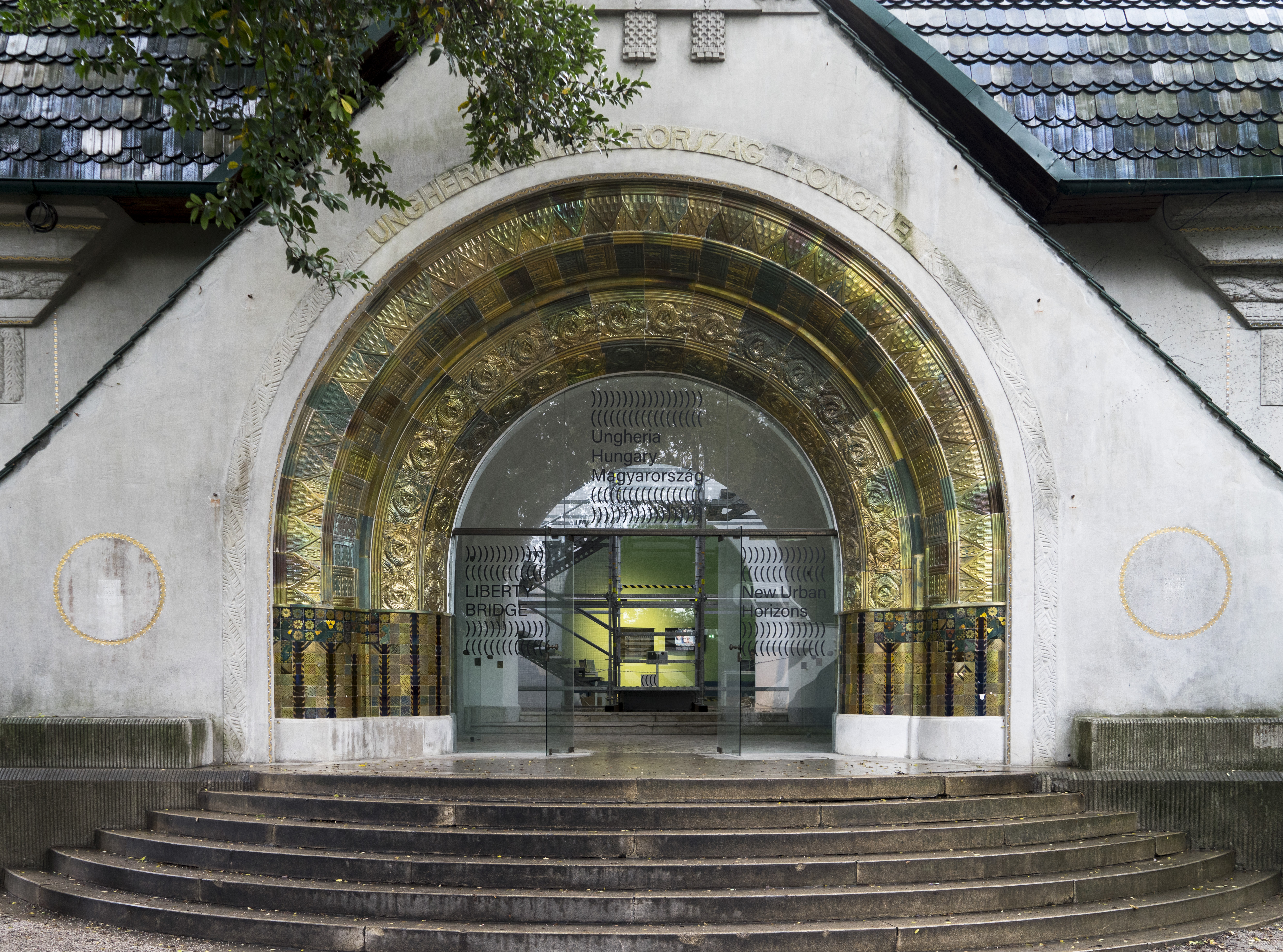 Biennale Venedig, Ungarn Pavillon